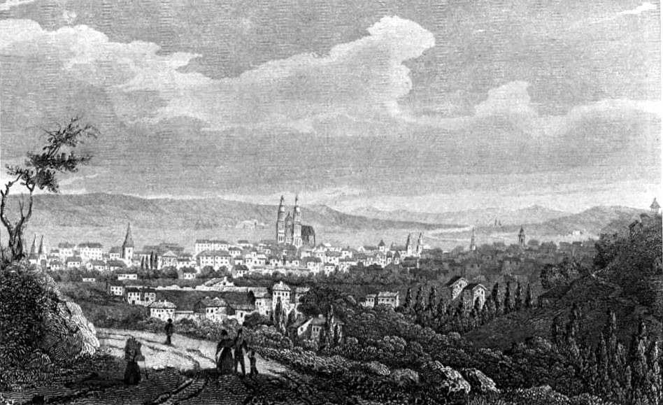 Image en provenance du livre : Eusèbe Girault de Saint-Fargeau, Guide pittoresque du voyageur en France, contenant la statistique et la description complète des quatre-vingt-six départements, orné de 740 vignettes et portraits gravés sur acier, de quatre-vingt-six cartes de départements et d'une grande carte routière de la France, par une Société de gens de lettres, de géographes et d'artistes, Paris, F. Didot frères, 1838, 6 volumes in-8° (BNF : 8-L25- 46). Volume III Didot frères, 1838. Route de Paris à Nice traversant les départements de l'Isère, des Hautes-Alpes, des Basses-Alpes et du Var. auteurs dessins : Rauch (ou autre) auteurs gravures : Skelton fils, Schroeder, Bishop (ou autre)